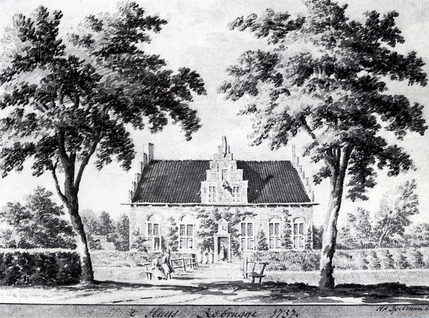 Havezate Robrugge (Rheebruggen) in 1737